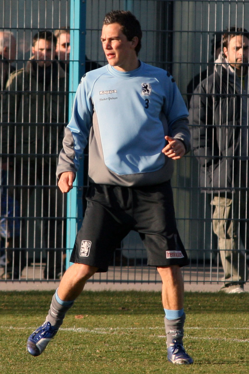 Marcel Schäfer, player of TSV 1860 München, training, 20.01.2007, Grünwalder Str., Munich